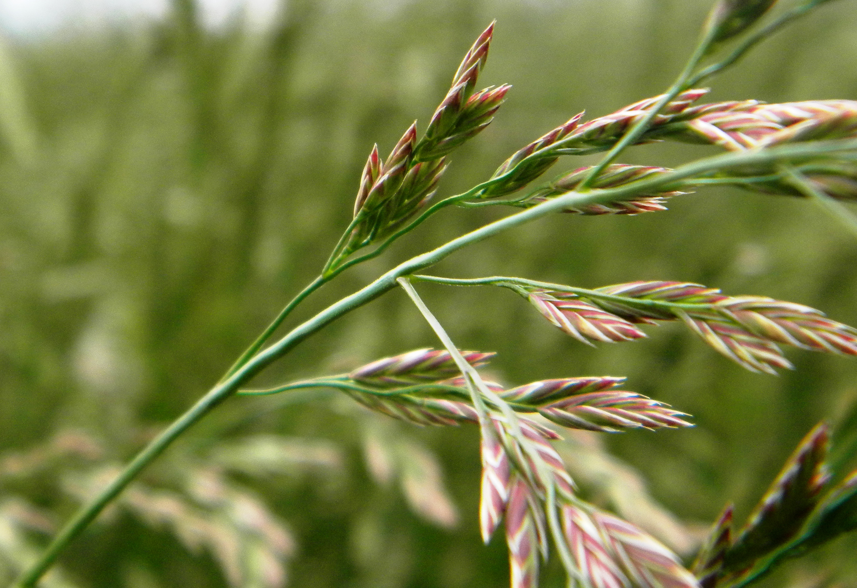 Festuca rubra